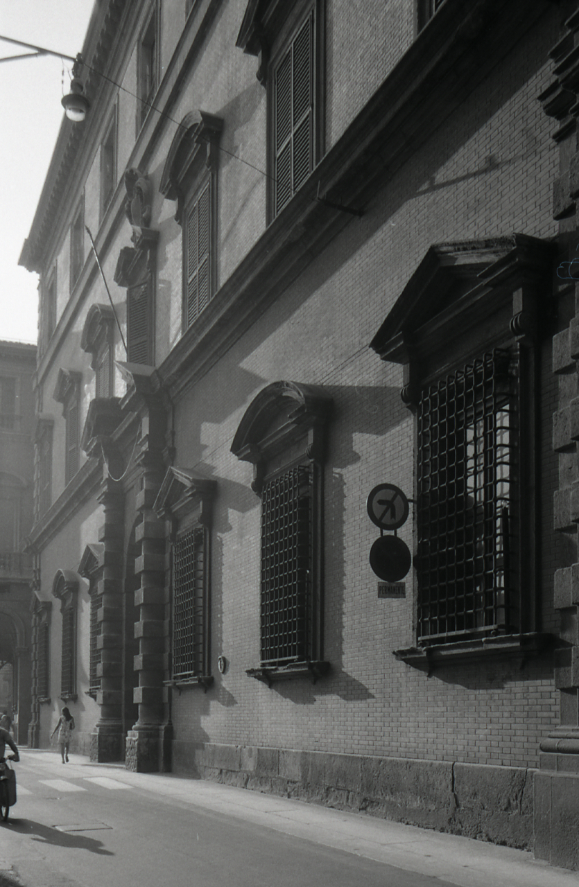 Servizio fotografico : Bologna, 1971 / Paolo Monti. - Strisce: 7, Fotogrammi complessivi: 38 : Negativo b/n, gelatina bromuro d'argento/ pellicola ; 35 mm. - ((Sul portanegativi: NIKMAT Agfa 100. - Occasione: Campagna di rilevamento territorio Bologna e varie: riprese luoghi stendhaliani. - Fonte: Agenda di Paolo Monti: Leica 1501-3000 Controllo numerazione (1950-1978), presso Archivio Paolo Monti. - Fonte: Fattura di Paolo Monti: IV. Commesse/ Fattura/ Rilevamento fotografico case rurali e ambiente del territorio di Bologna/ Altre riprese varie a Bologna e territorio (1972/04/08), presso Archivio Paolo Monti. N. 14 riprese luoghi stendhaliani con 18x24